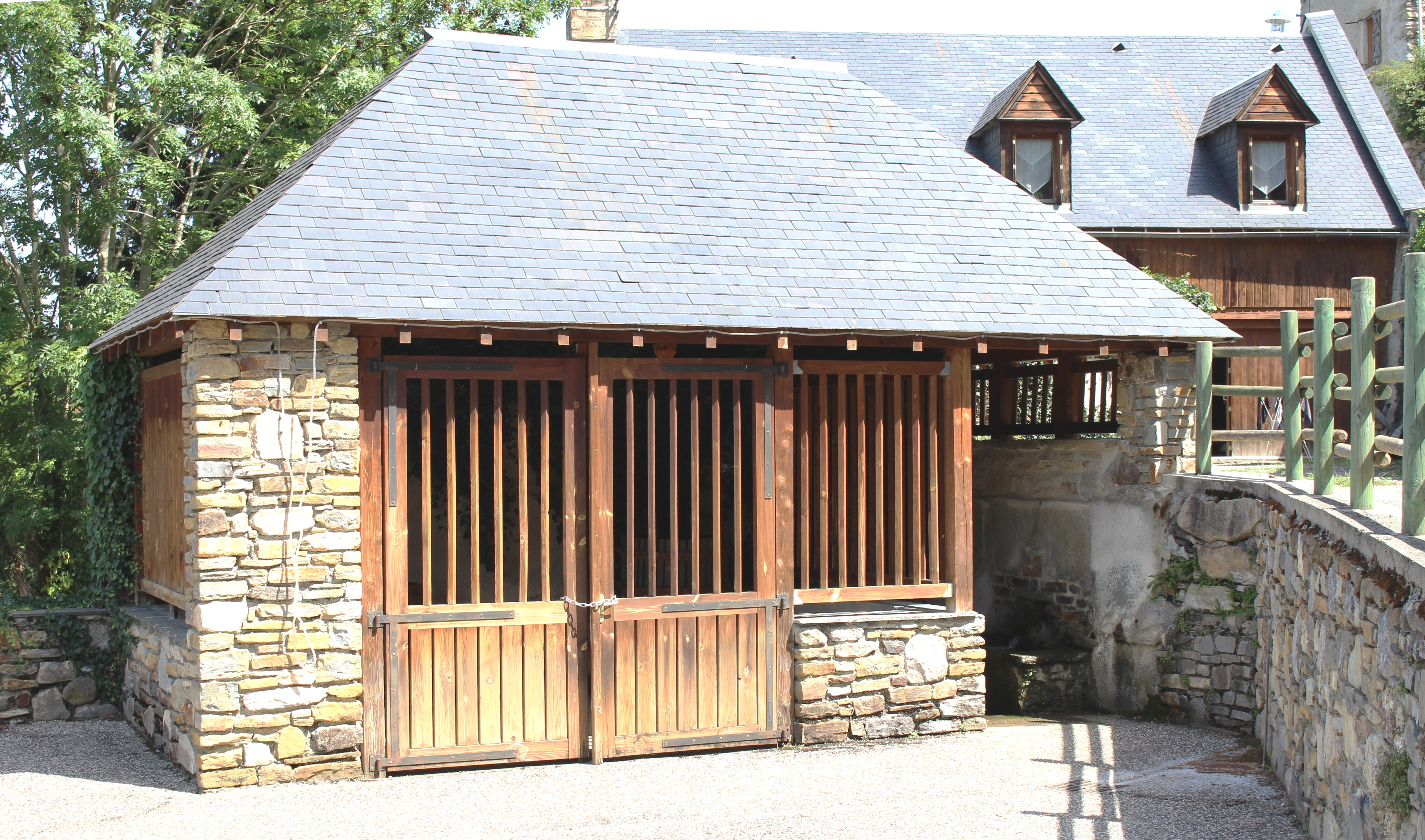 Lavoir de Camparan (Hautes-Pyrénées)